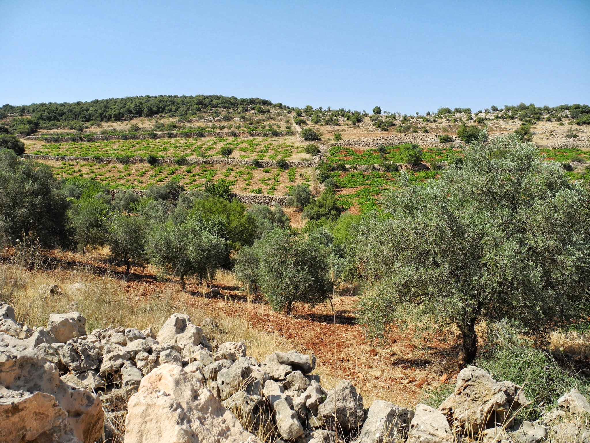 04 Ajloun Castle Circuit -Landscape